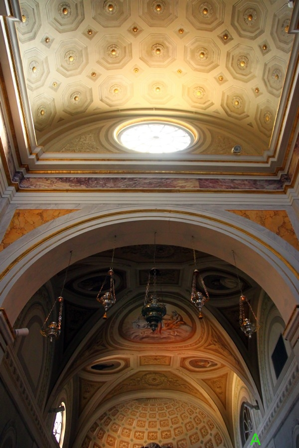 Cappella destra del duomo di san miniato, dove dovrebbe essere entrata la granata della strage del '44 (finestra con lettera A verde)